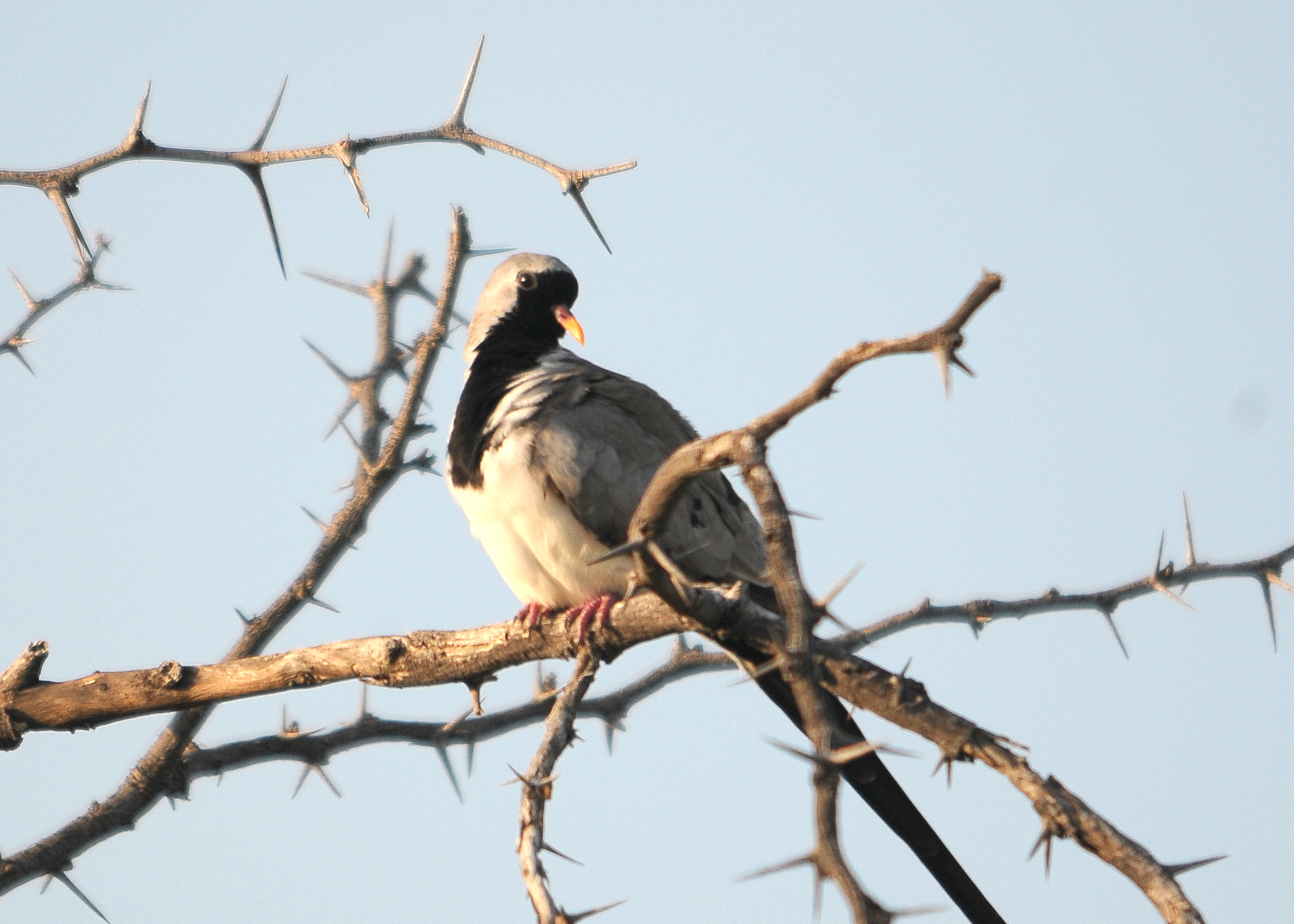 Namaqua Dove (Oena capensis)